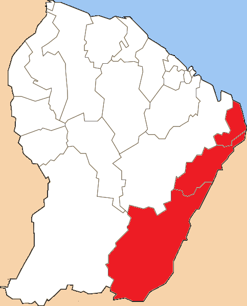 Situation du canton dans le département de la Guyane